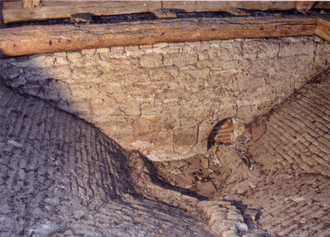 Abgemauertes Fenster am Dachboden der Kirche von Altlichtenwarth